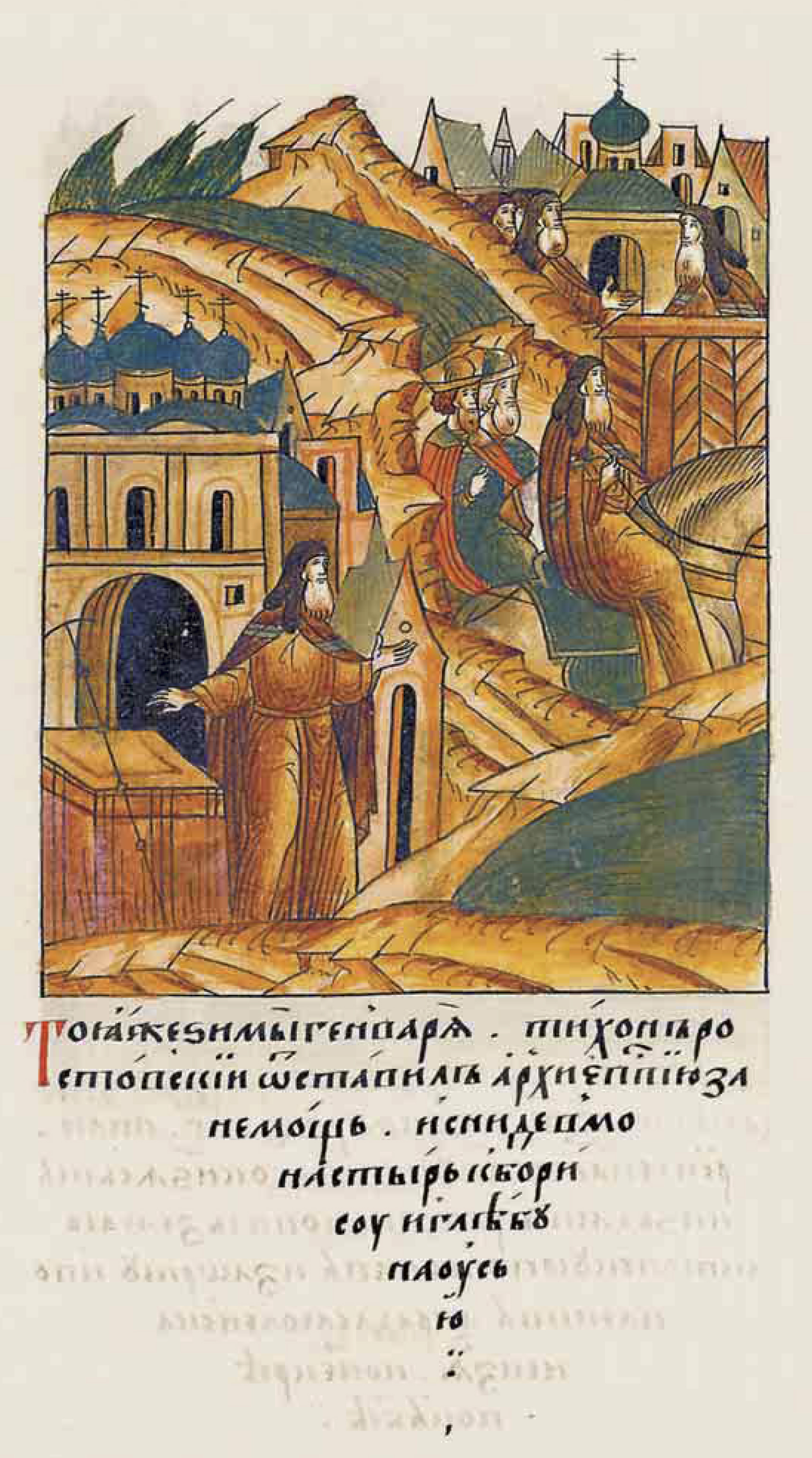 В ту же зиму в январе Ти- хон Ростовский оставил архиеписко- пию по своей немощи и ушел в Ростовский Борисоглебский мона- стырь на Устье.